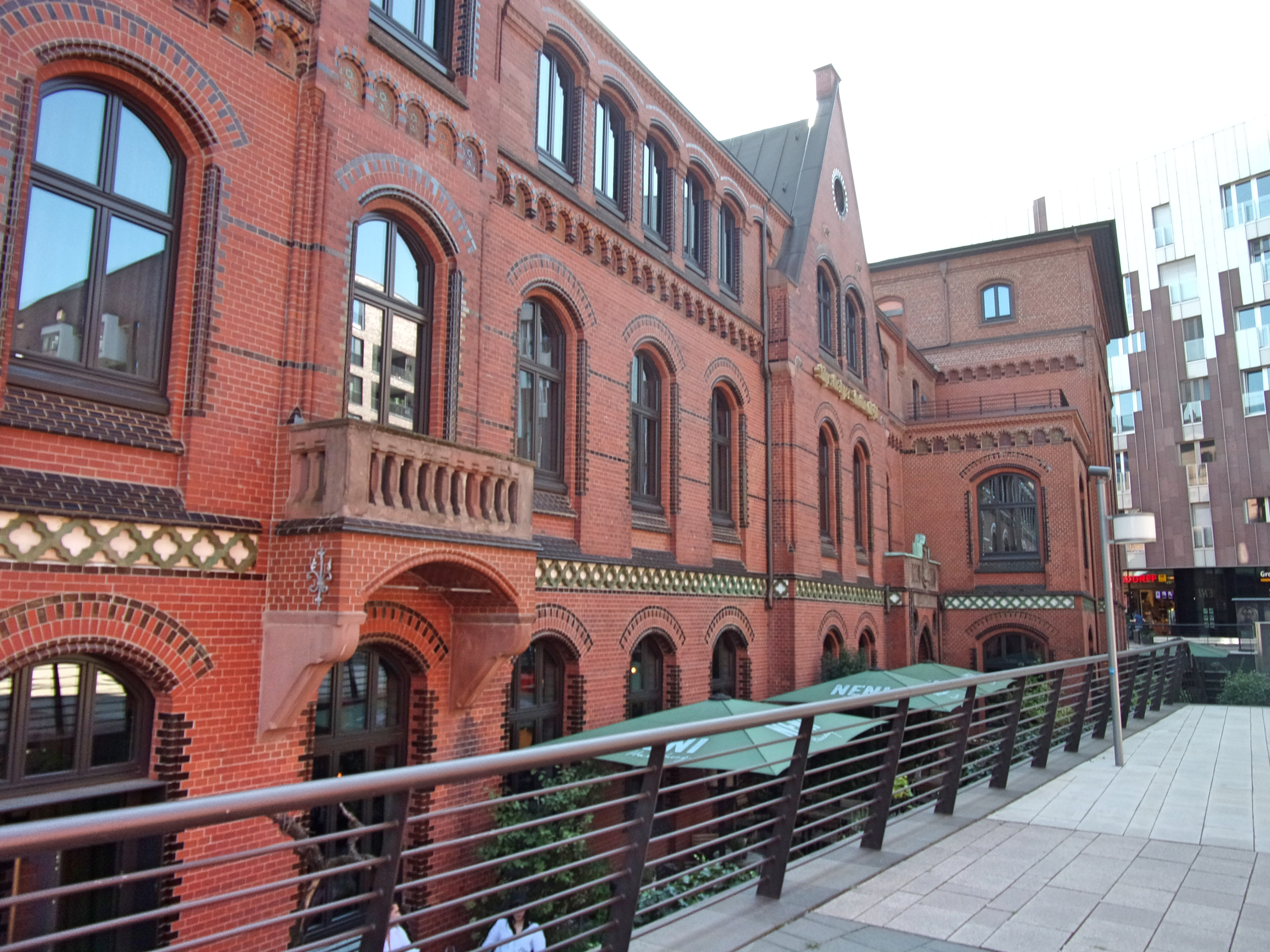 Fassade vom " Alten Hafenamt " in der Nachnutzung als Hotel und Gastronomiebetrieb mit Ansicht zum Marktplatz, Überseequartier Hamburg.